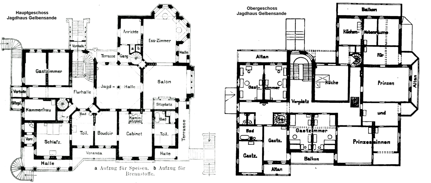 Grundrisse Hauptgeschoss und Obergeschoss Jagdschloss Gelbensande